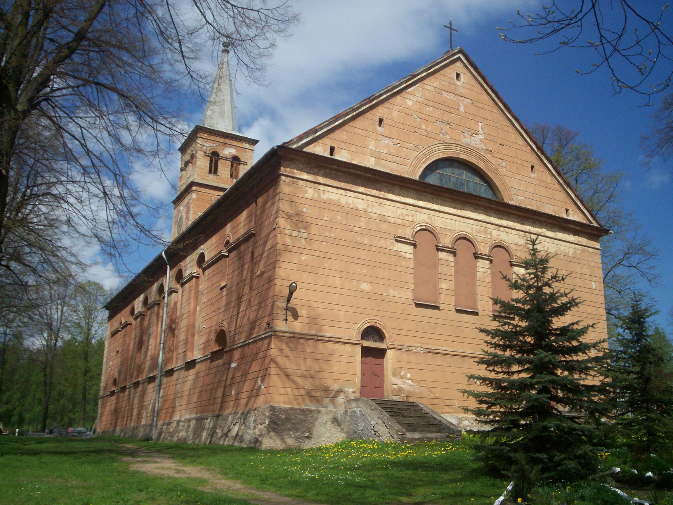 Kościół pw. „Niepokalanego Serca N.M.P.” w Marciszowie.